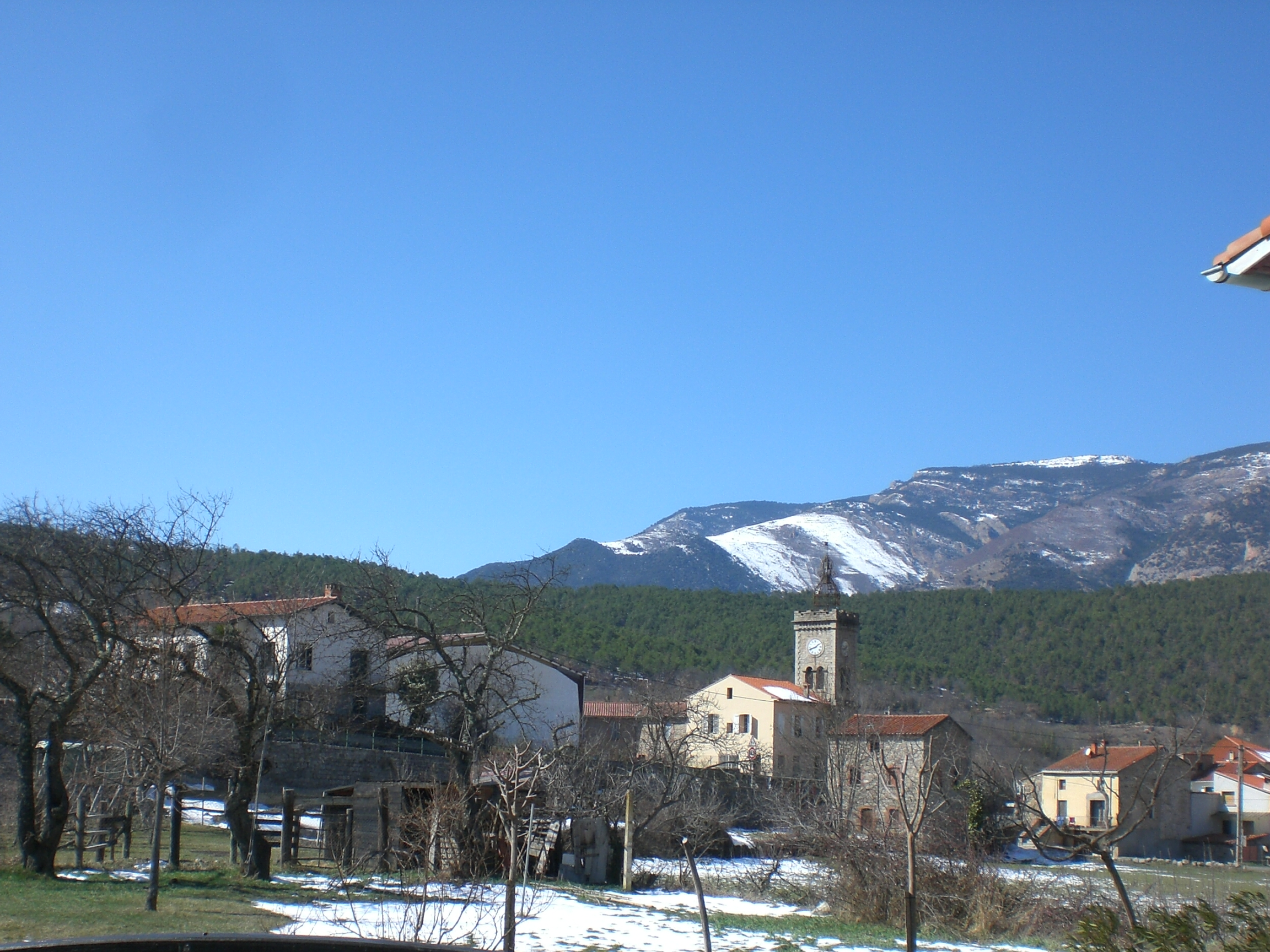 vue sur Fuilla du milieu